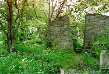 foto door Ezel 2003